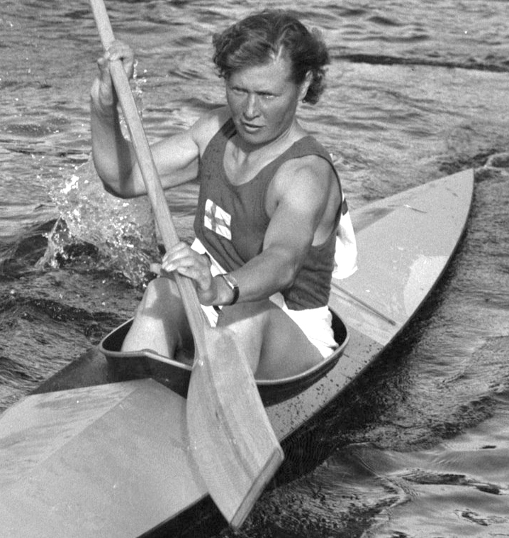 Suomalainen meloja Sylvi Saimo (1914-2004) Helsingissä järjestetyissä kesäolympialaisissa vuonna 1952.